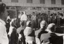 חנוכת בית פיליפס לצופים -1961